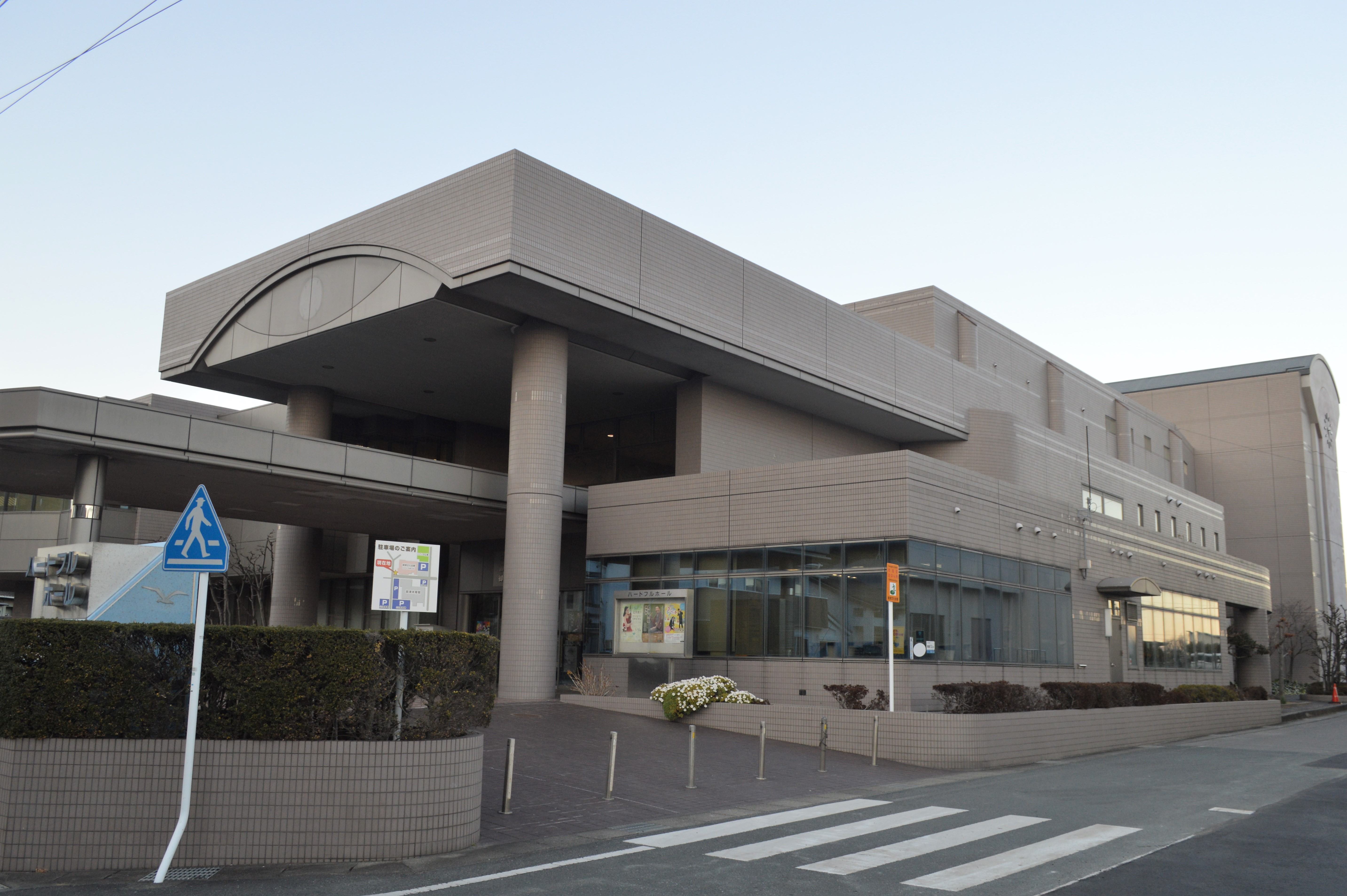 愛知県豊川市にある豊川市御津文化会館。